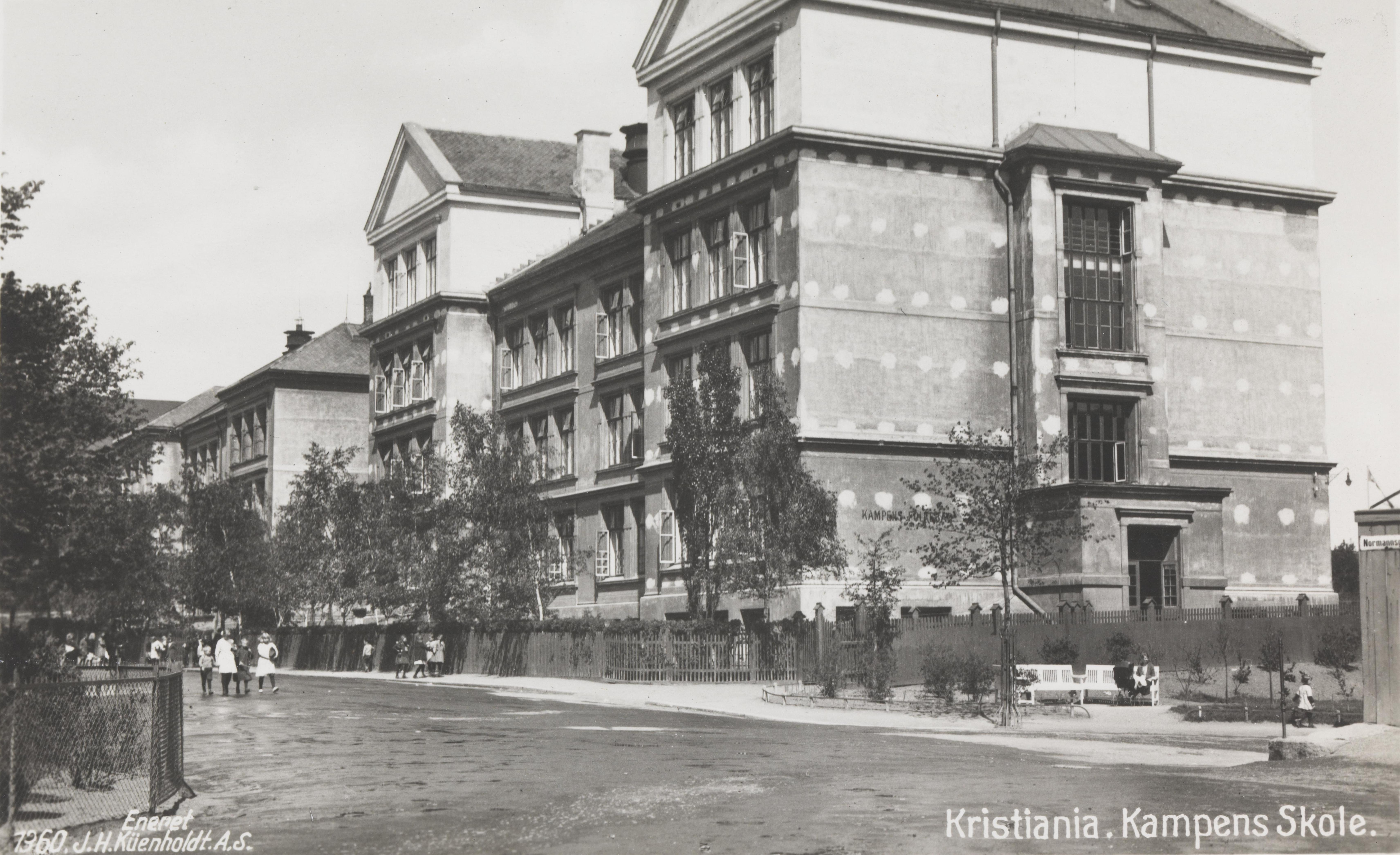 Bildet er hentet fra Nasjonalbibliotekets bildesamling Kampen,Kampen skole, Oslo, Oslo